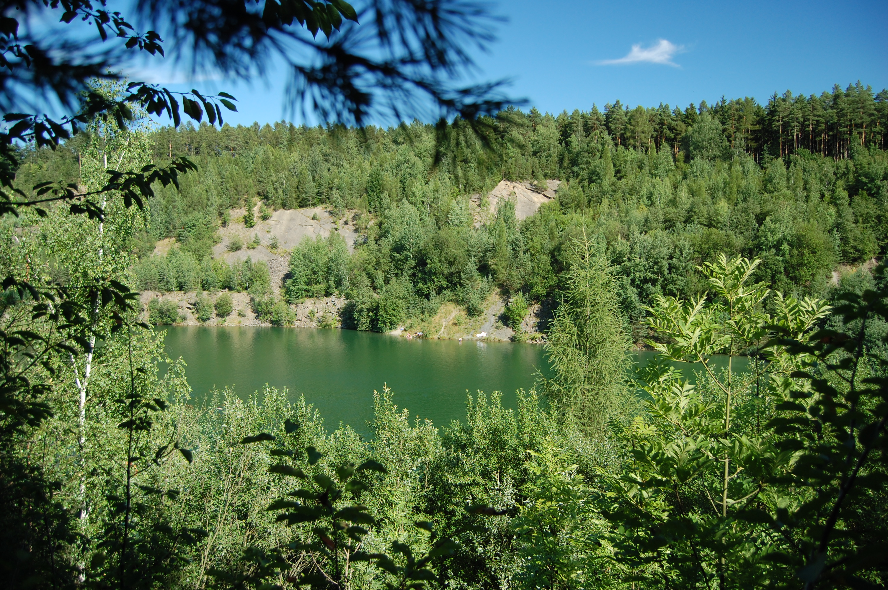 Zatopený lom u obce Nová Ves - pohled od silnice, Litovel, okres Olomouc